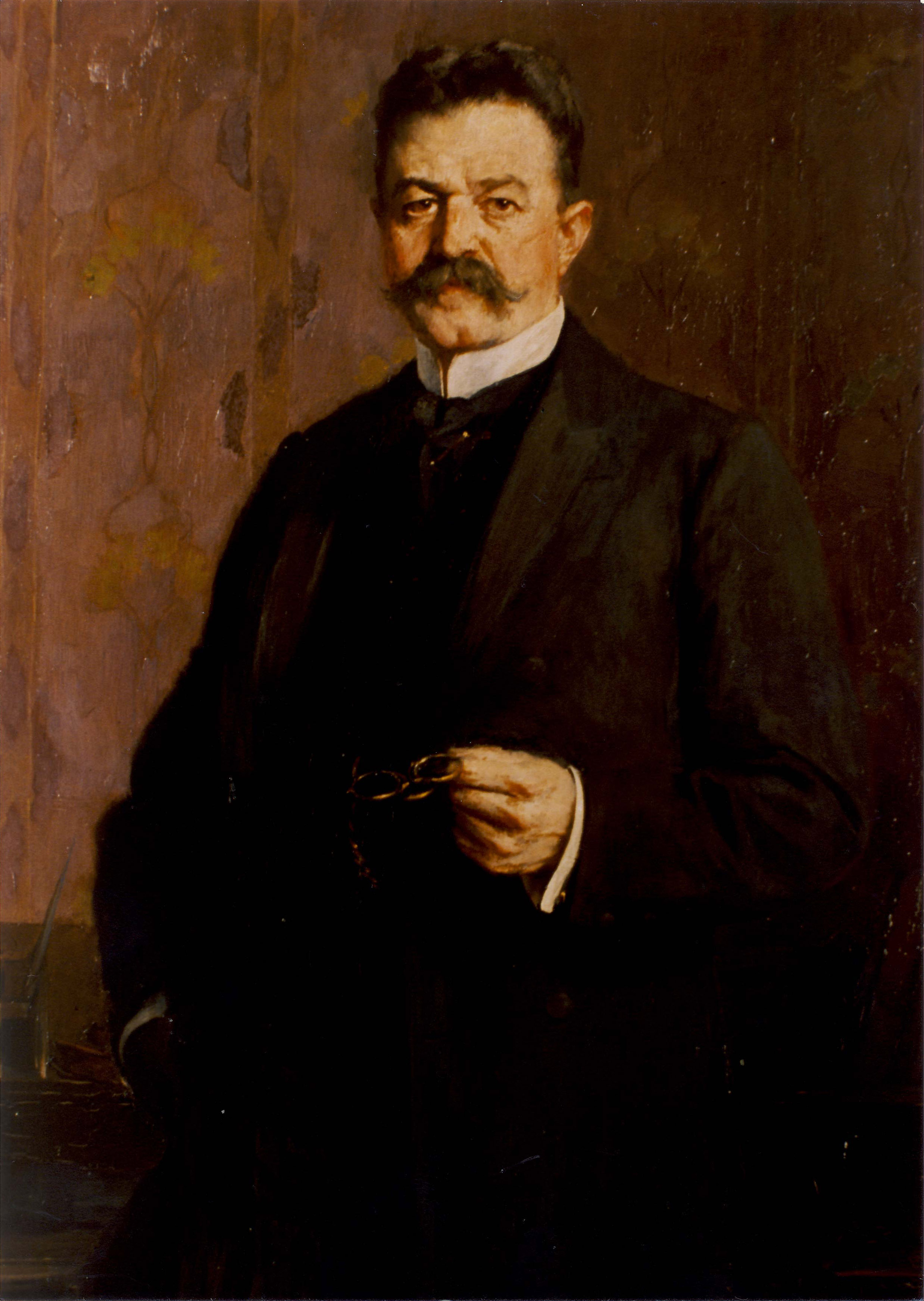 Dr. Heinrich Sturm, Chemnitzer Oberbürgermeister von 1908 bis 1917